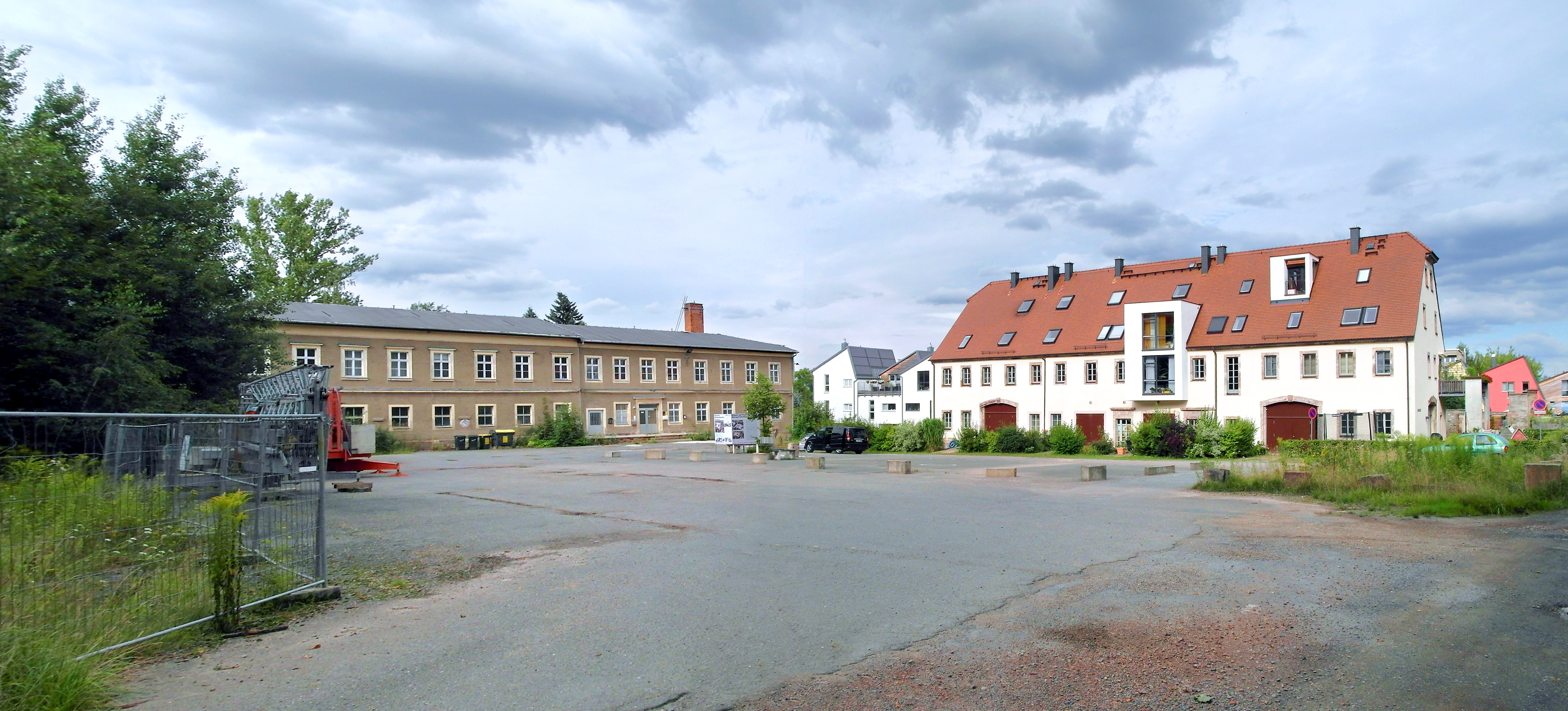 01.08.2016 09117 Rabenstein / Niederrabenstein (zu Chemnitz): Rittergut mit Herrenhaus Niederrabenstein (links), Hofseite. Trützschlerstraße 8. Georg von Carlowitz erwarb 1576 vier Höfe in Niederrabenstein. Das Rittergut Niederrabenstein entstand dann, als das Dorf Niederrabenstein der Familie als erbliches Lehen übertragen wurde. 1686 wurde die Herrschaft Niederrabenstein verkauft. 1831 erwirbt der Limbacher Kaufmann und Fabrikant Traugott Reinhold Esche das Rittergut Niederrabenstein und läßt 1834 das Herrenhauses erbauen. 1980 brennt das hohe Dach mit Dachreiter und Gaupen ab und wird durch das heutige flachgeneigte Nordach ersetzt. Das Stall- und Speichergebäude (rechts) ist noch vorhanden. Es wurde in den letzten Jahren saniert und in Eigentumswohnungen geteilt. Die Sanierung des Herrenhauses ist vorgesehen. [SAM7470+7471.JPG]20160801880MDR.JPG(c)Blobelt